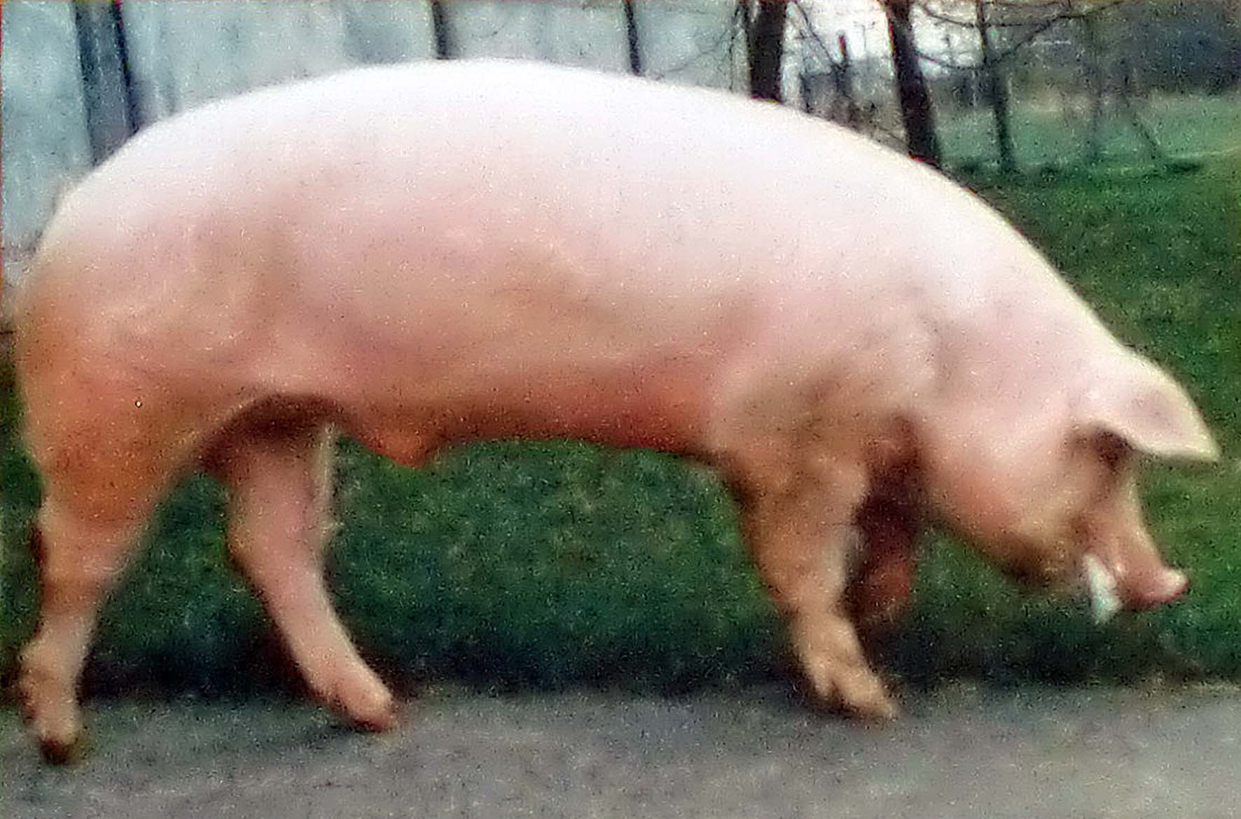 Stammeber Siegel B 30083 Züchter Agrargenossenschaft Bornum (Sachsen-Anhalt), 1991